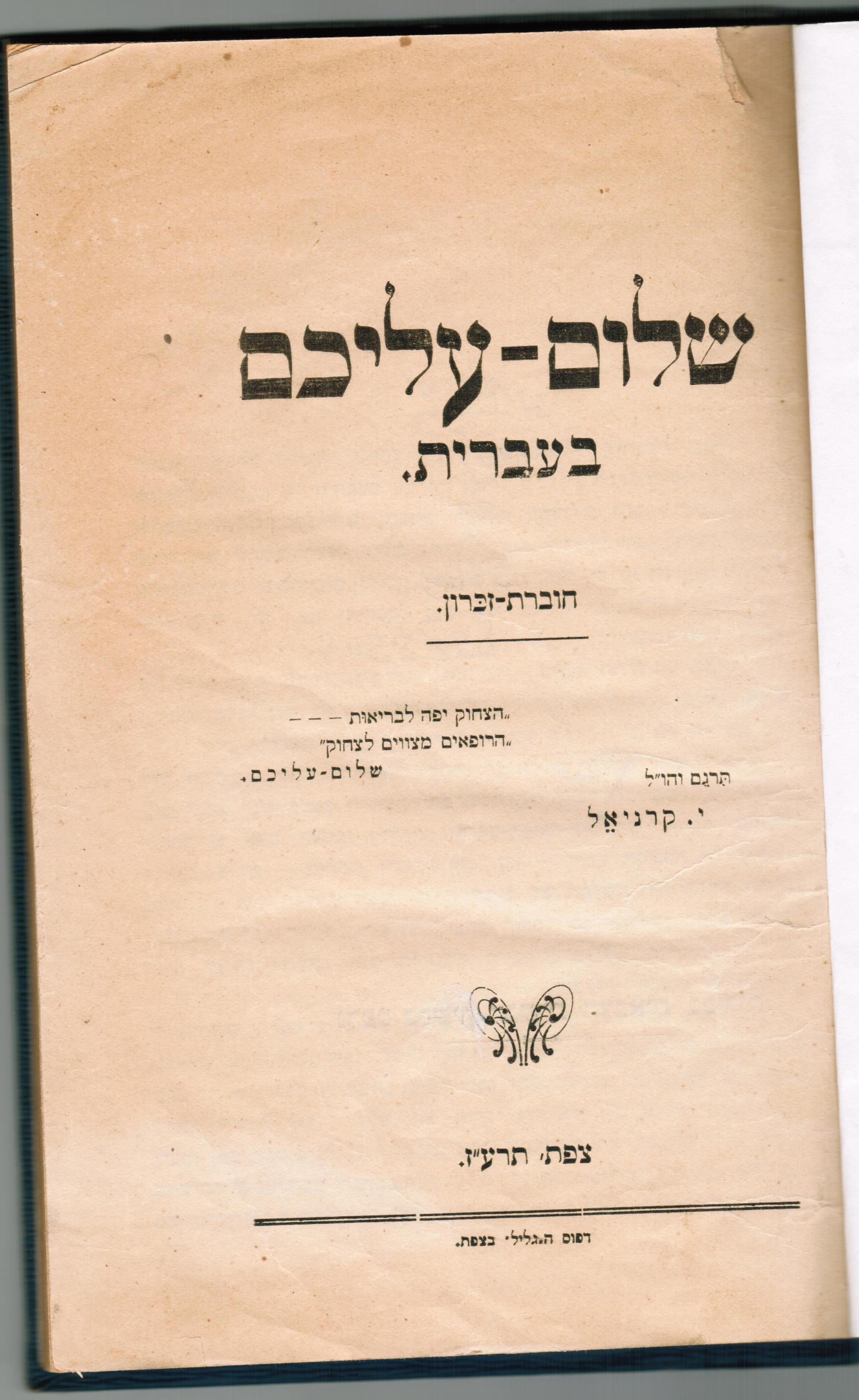 חוברת מתורגמת של יצירותיו של שלום עליכם. תורגמה ע"י ישעיהו קרניאל (עזמות) בשנת 1917